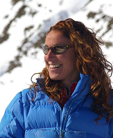 Izaskun Zubizarreta eskiatzailea 2011n